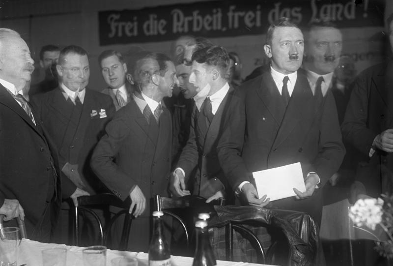 Adolf Hitler, der Führer der Nationalsozialisten, spricht vor Zehntausenden in Berlin ! Adolf Hitler während seiner Rede in der grossen Tennishalle am Fehrbelliner Platz in Berlin.